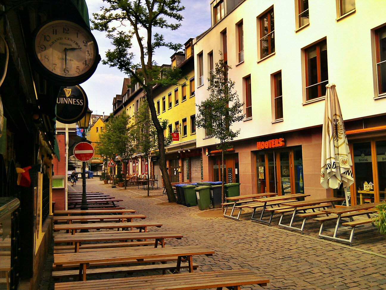 Kleine Rittergasse